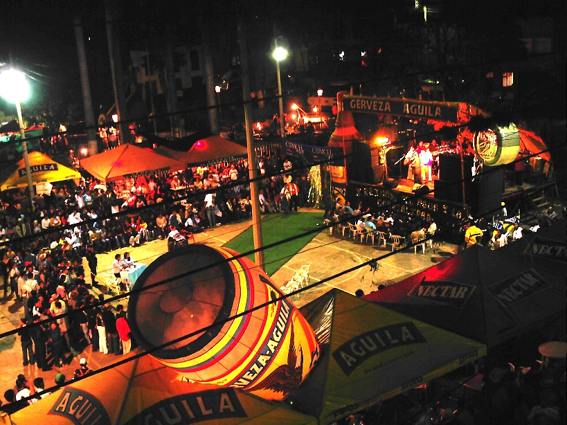 Imagen nocturna de las ferias y fiestas del municipio de Venecia, Expovenecia 2006